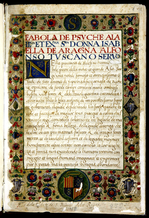 Frontispici amb ornamentació floral. En la part superior una "S", en la inferior l'escut dels ducs de Calàbria